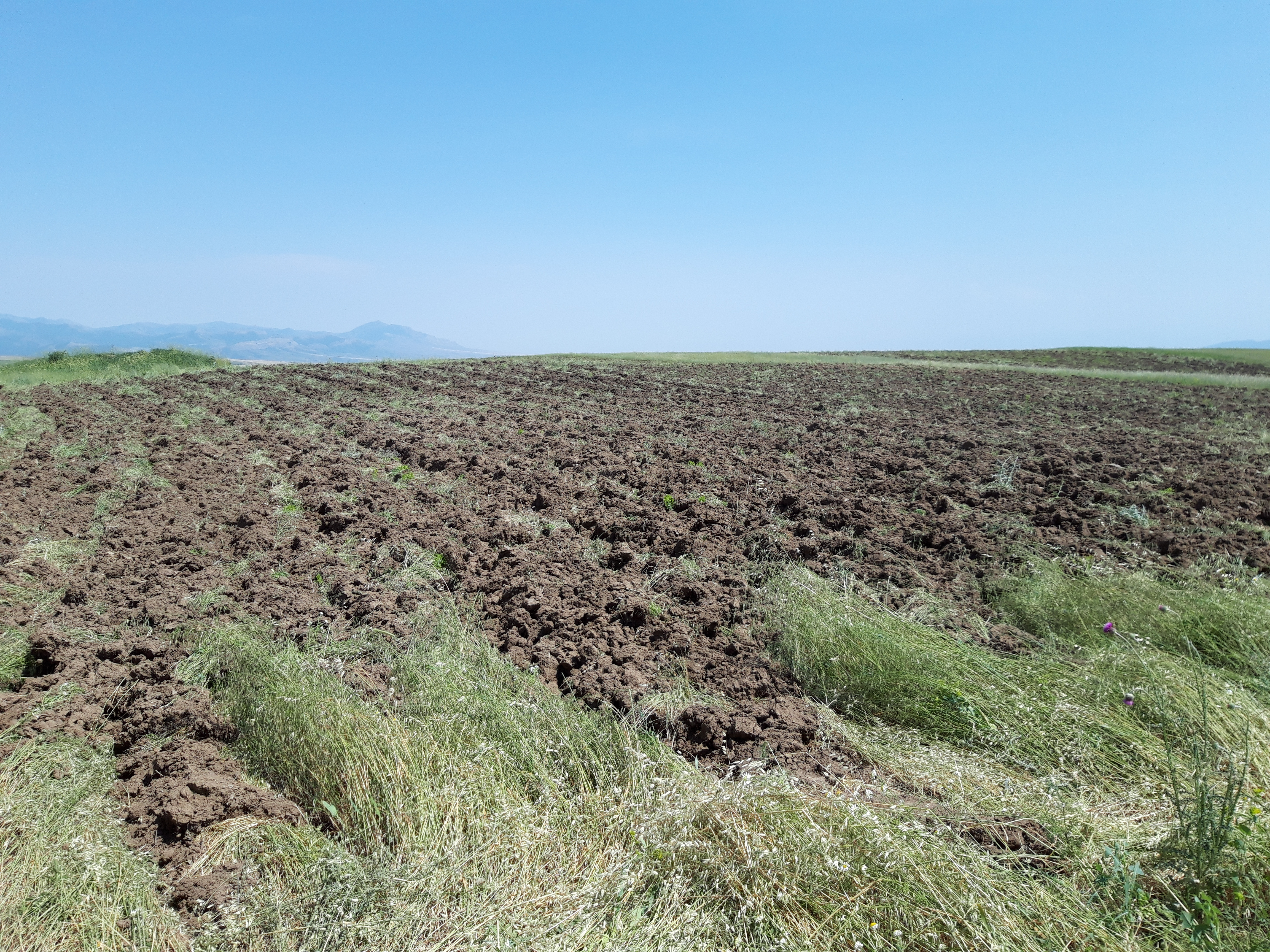 Կանաչ պարարտացում՝ վարի միջոցով բուսածածկը հողի տակ շրջելու ձև